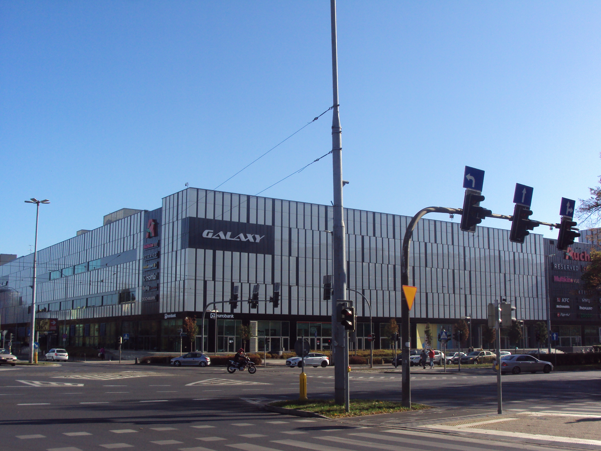 Centrum handlowe Galaxy w Szczecinie